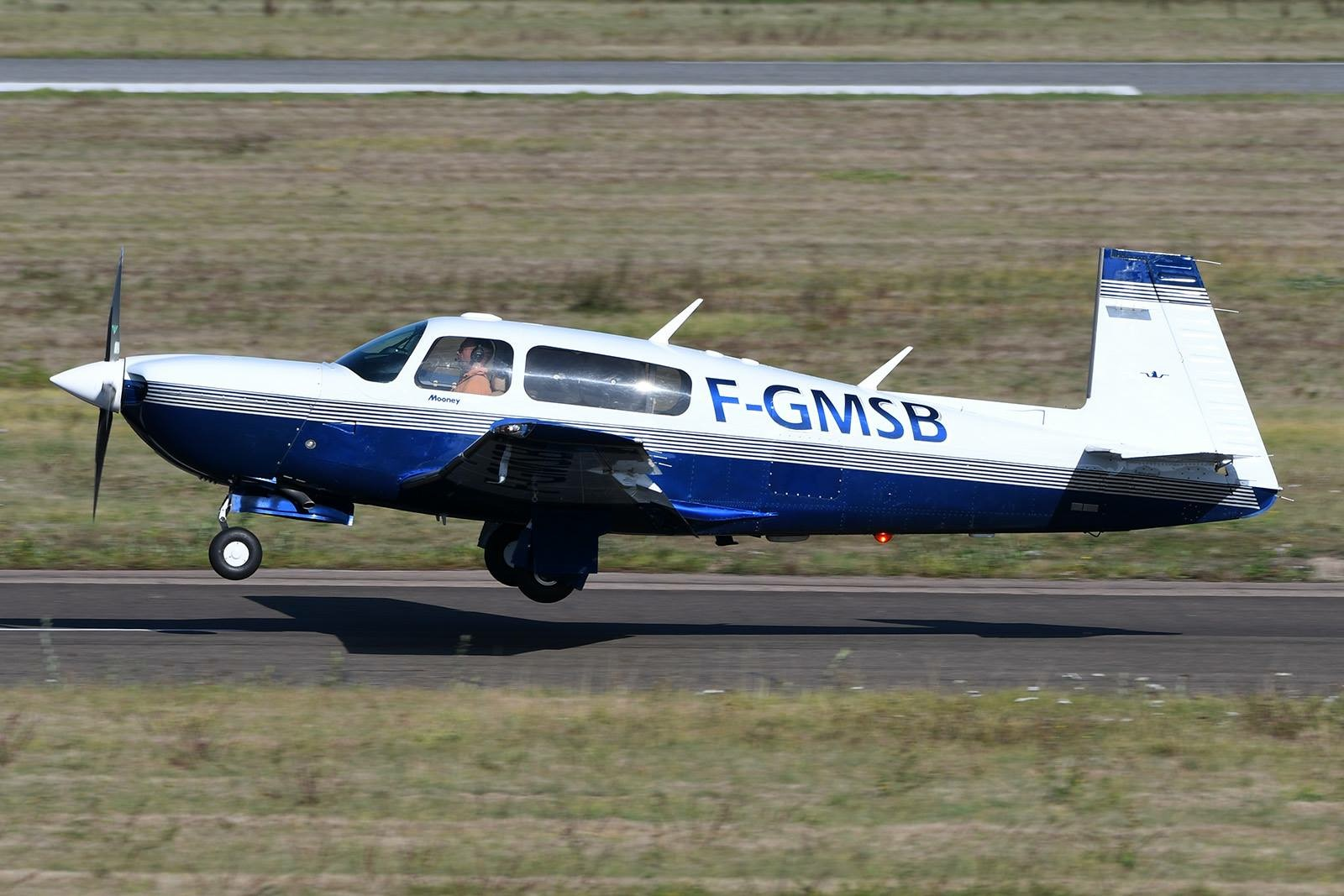 Mooney M20M Bravo à l'atterrissage à Toussus le Noble